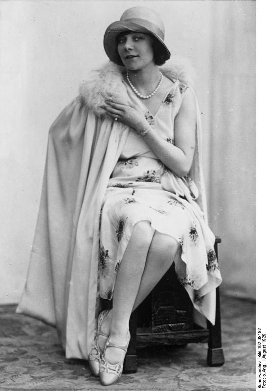 Die geschiedene Herzogin von Anhalt Elisabeth Strickroth deren Scheidung seinerzeit viel Aufsehen erregte, tritt im staatl. Kur-Theater in Bad Oeynhausen in der Titelrolle des Luftspiels "Die Ballerina des Königs" auf. Die geschiedene Herzogin von Anhalt, Elisabeth Strickroth im Kur-Theater in Bad Oeynhausen.